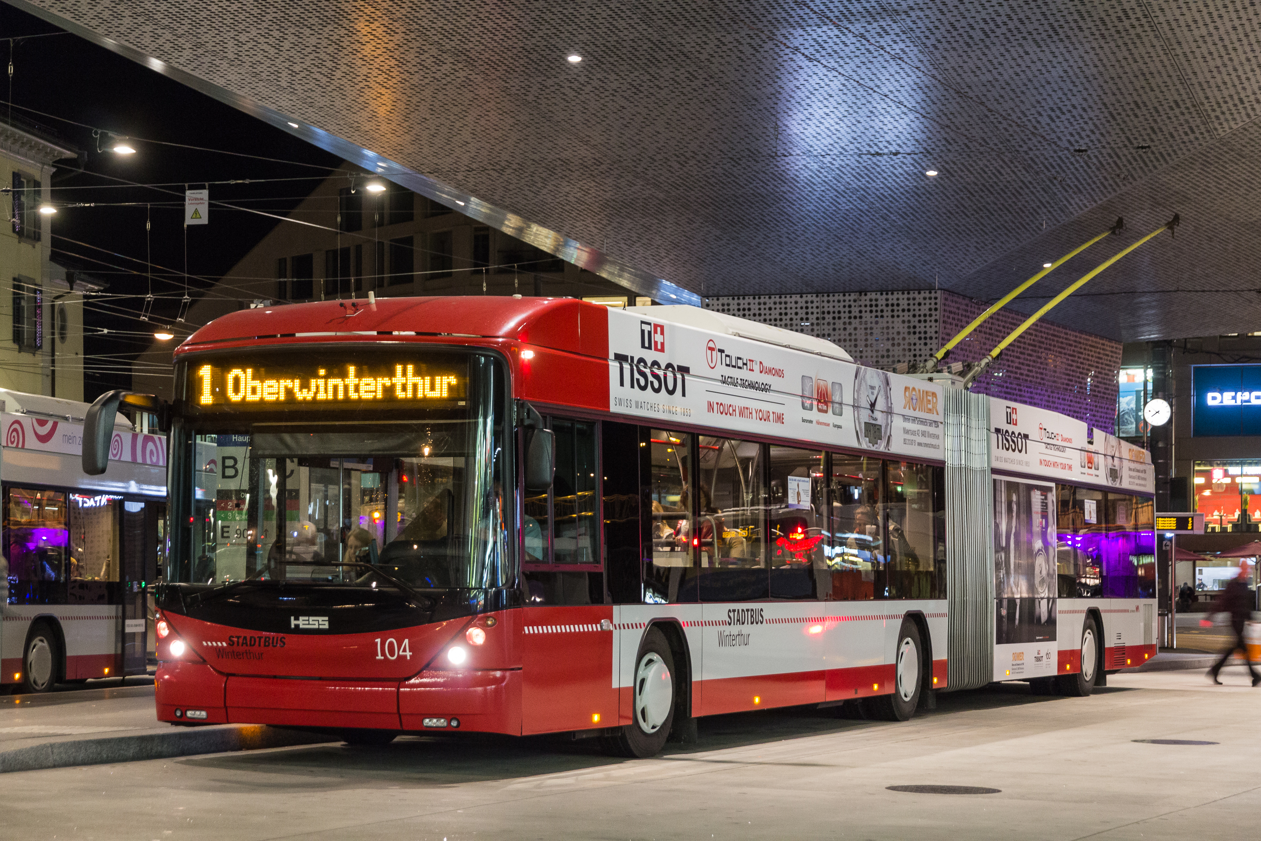 Hess Trolleybus unter dem Pilzdach des Busbahnhofs am Bahnhofplatz in Winterthur